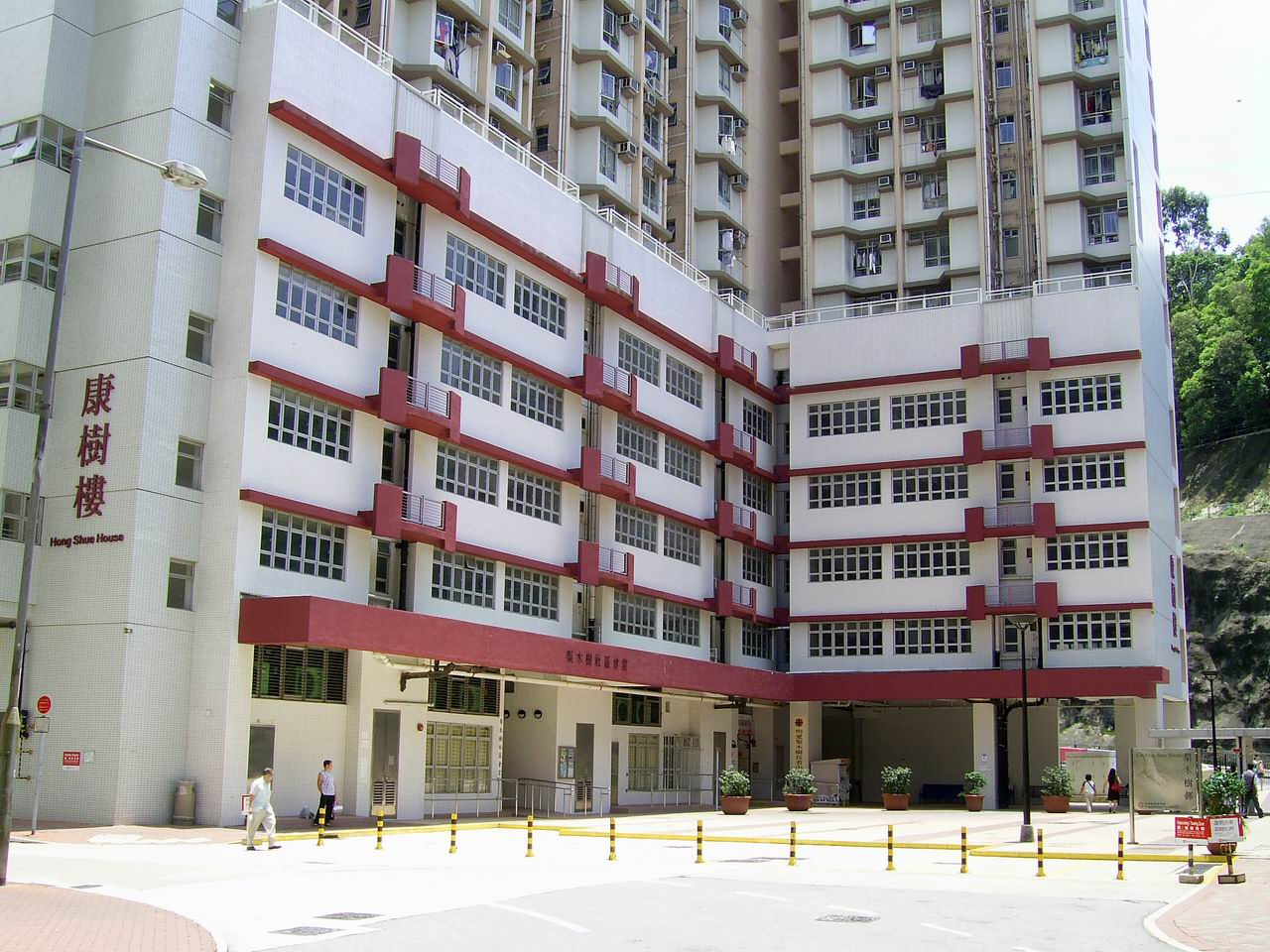 中文（香港）: 梨木樹邨社區會堂